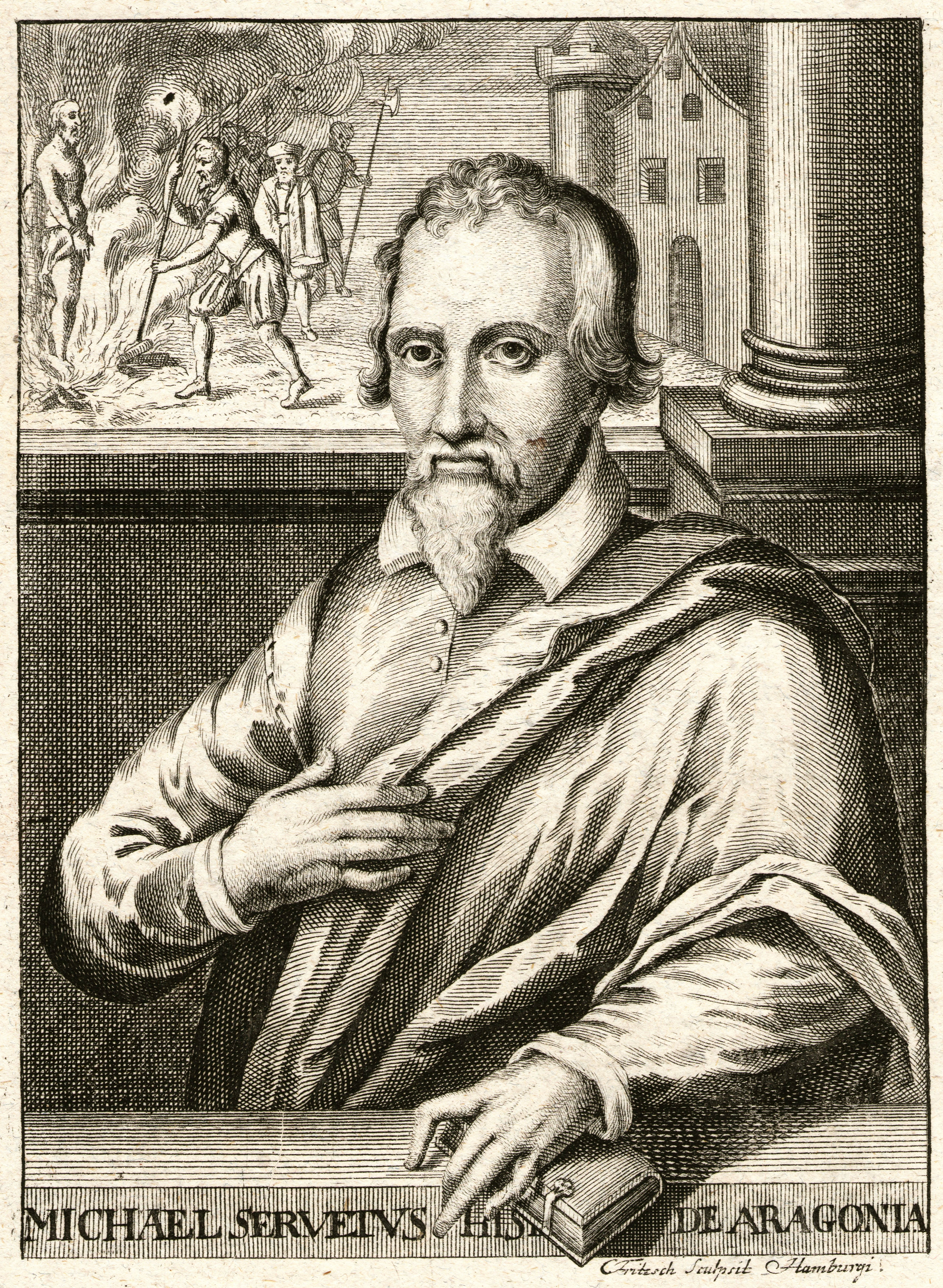 Miguel Servet, Miguel de Villanueva (1511 - 1553) engraving